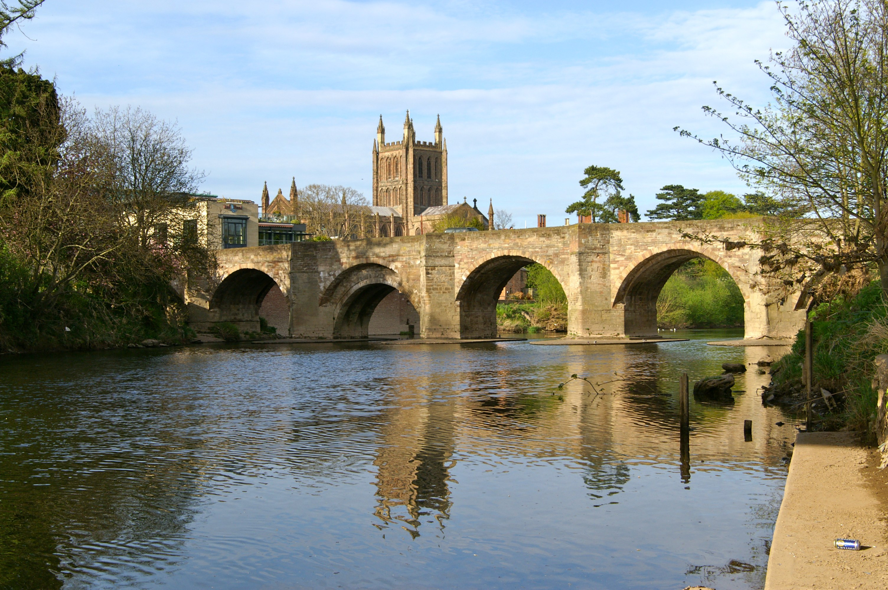 Hereford